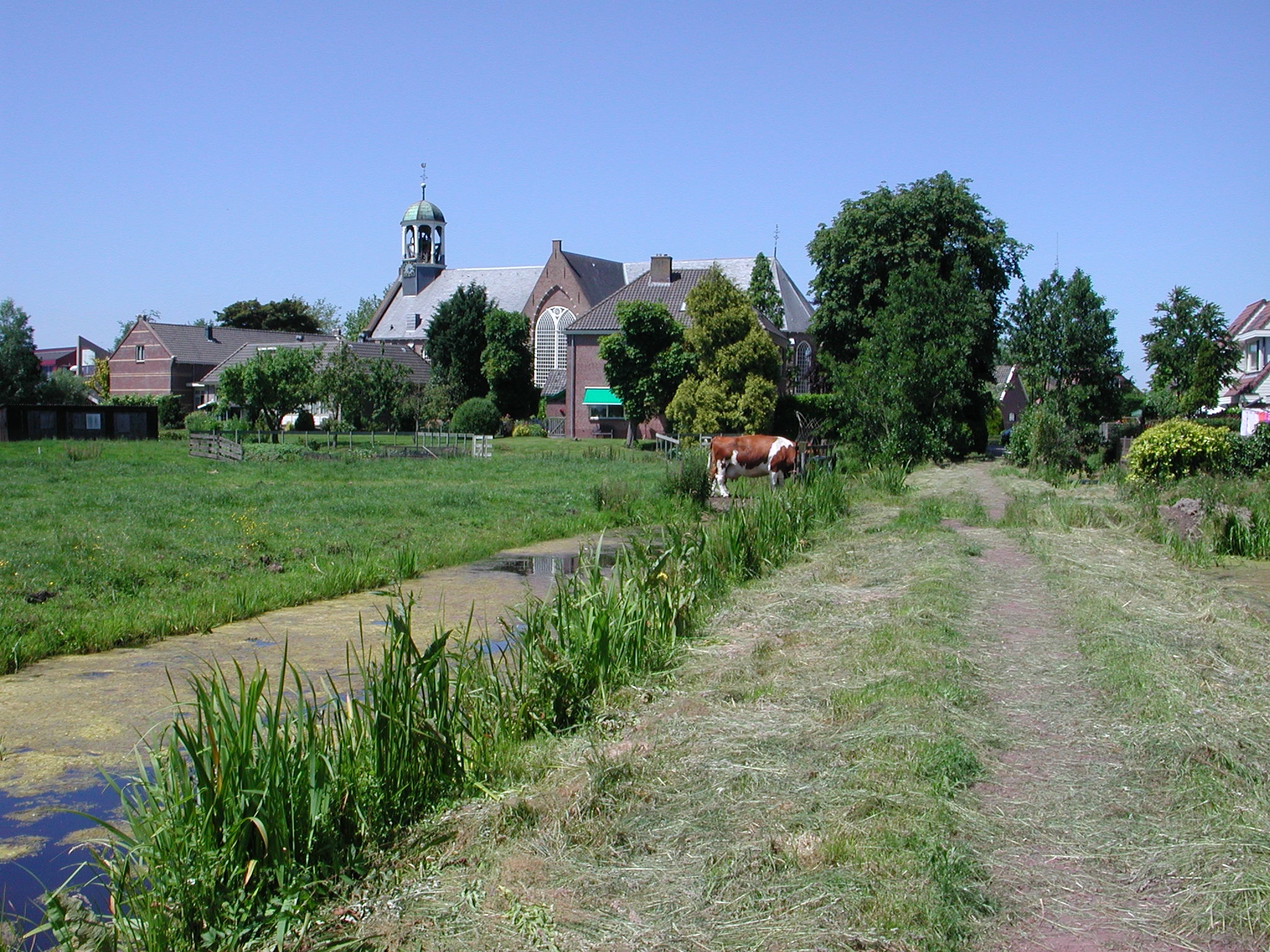 NH-kerk met Kerkelaantje, Waarder Object location52° 03′ 38.8″ N, 4° 49′ 08.69″ E